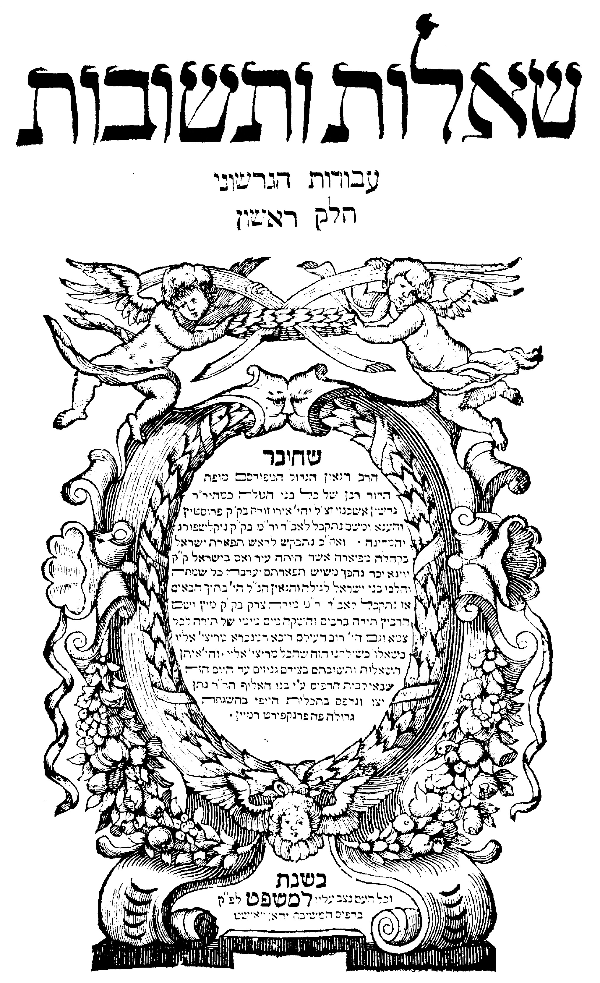 שער לשות עבודת הגרשוני